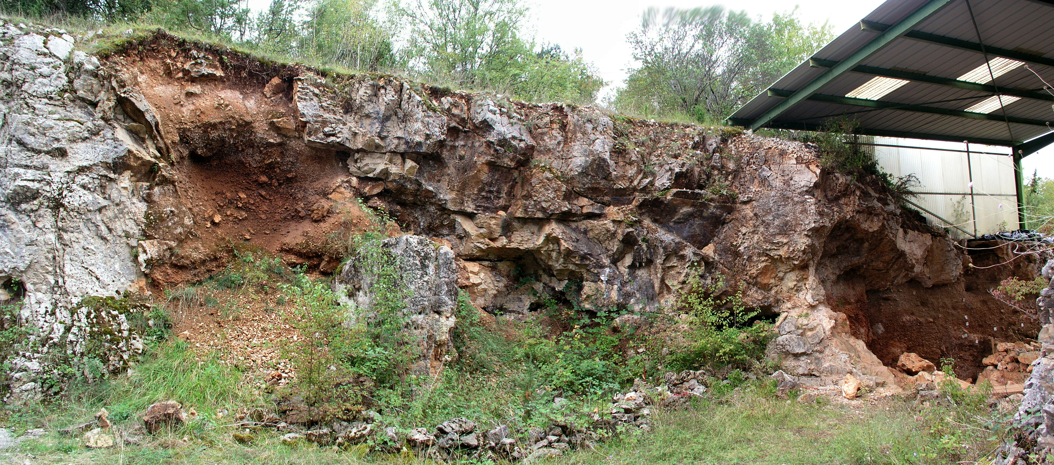 Site de Couloulous I à Tour-de-Faure.